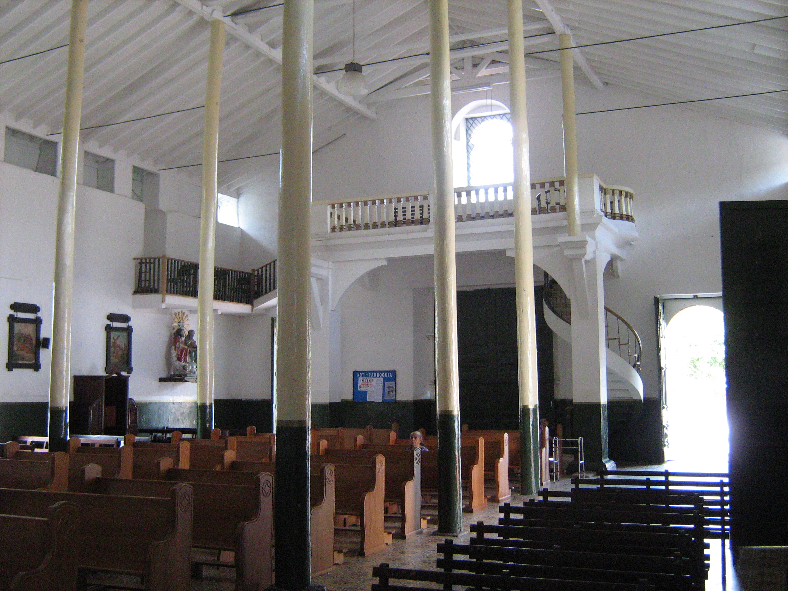 Capilla de María Auxiliadora en el municipio de Barbosa, Antioquia, Colombia.